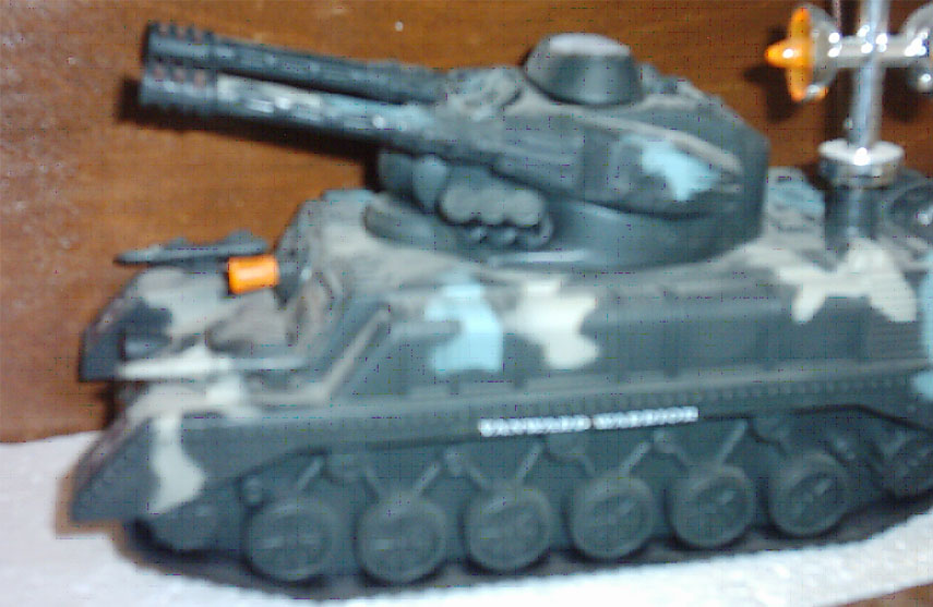 نماذج للمركبات البرية الحربية (منتج الصورة Eng_momo86)